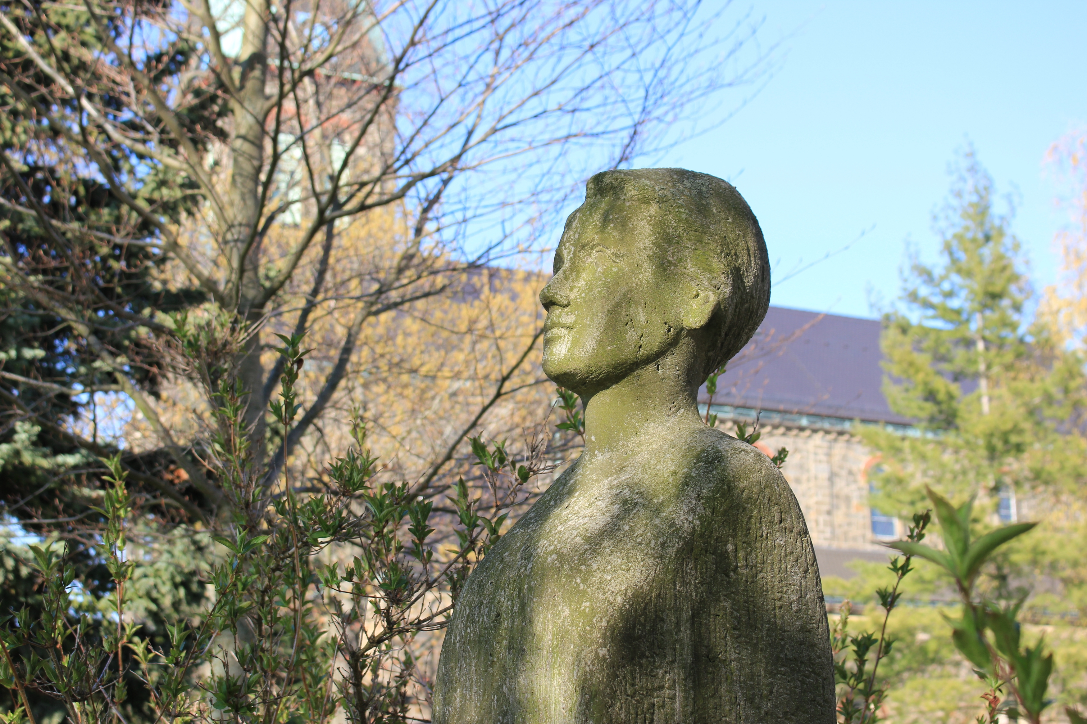 Hornjoserbsce: Połpostawa Marje Grólmusec před Radworskej šulu